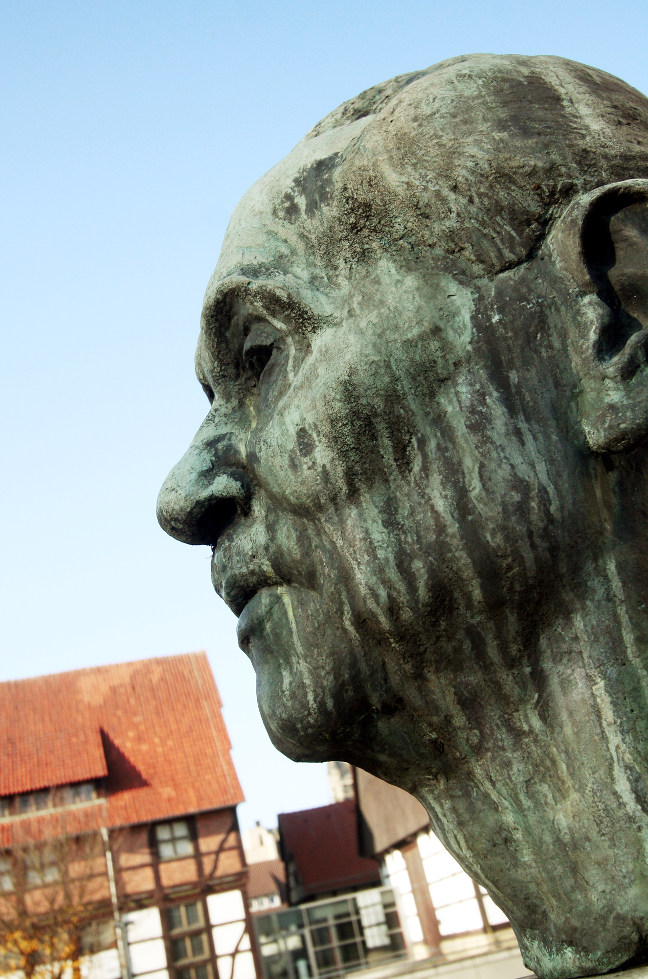 Heinrich Drake - Büste in der Detmolder Ameide (beim Lippischen Landesmuseum). Heinrich Drake im Profil.